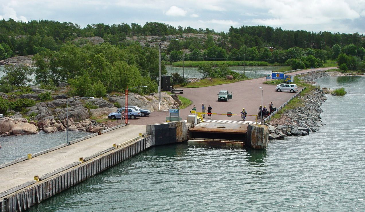 Åland: Ferry route Södra Linjen from Langnäs to Kökar, Överö